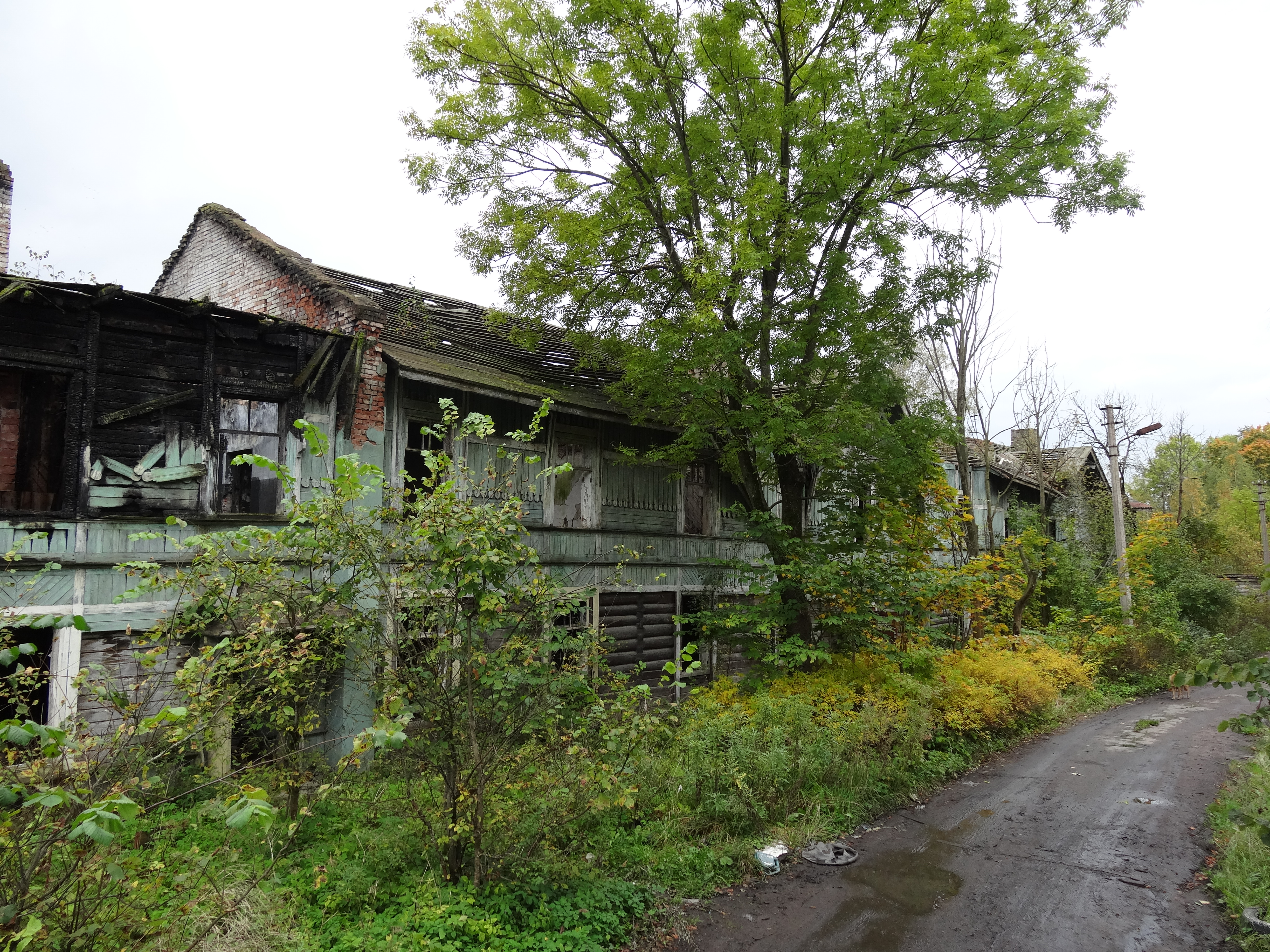 Фабричный посёлок: Фабричный посёлок, Красное Село, Красносельский район, Санкт-Петербург